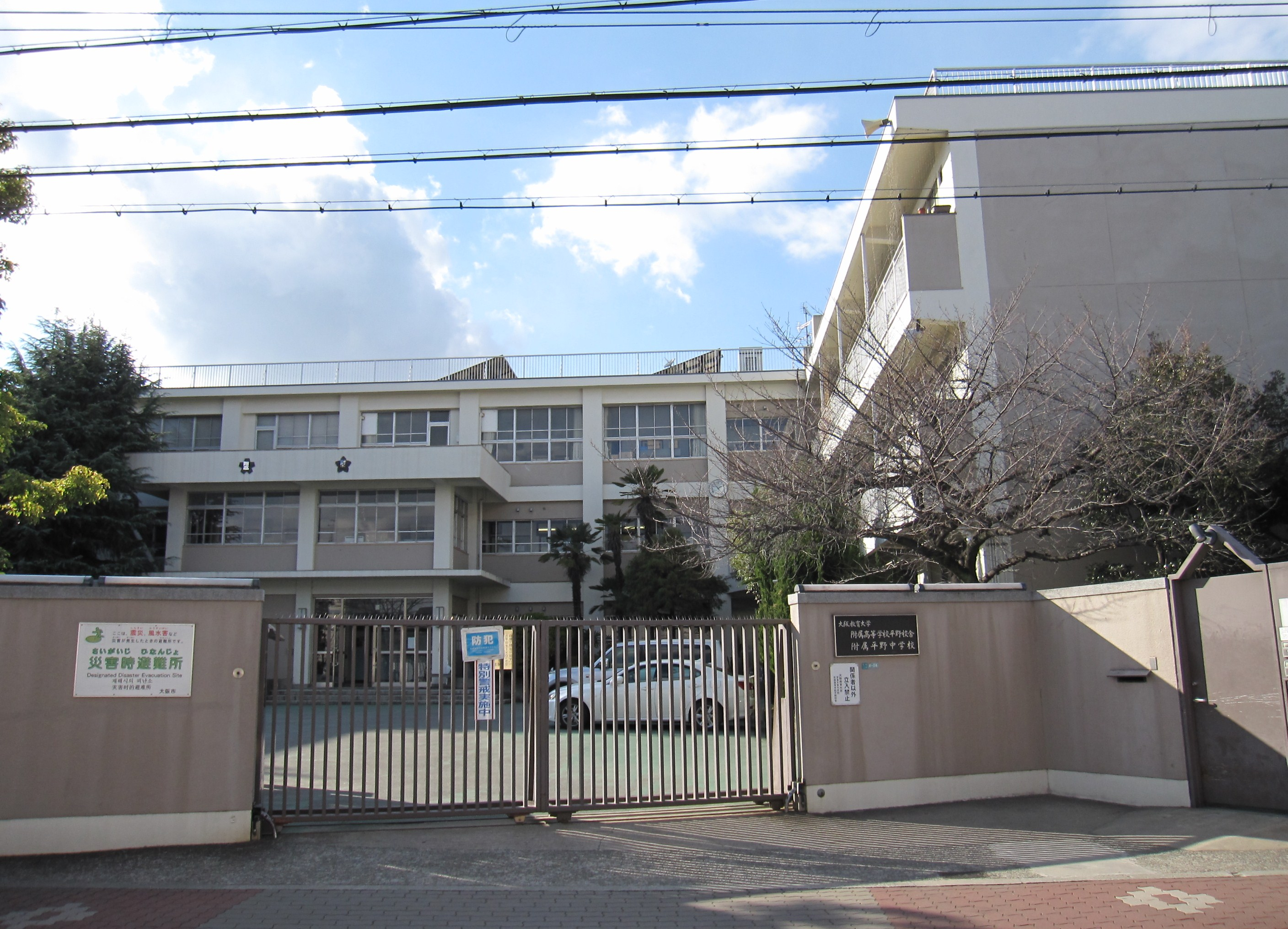 大阪教育大学附属平野中学校・大阪教育大学附属高等学校平野校舎